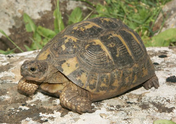 Testudo graeca